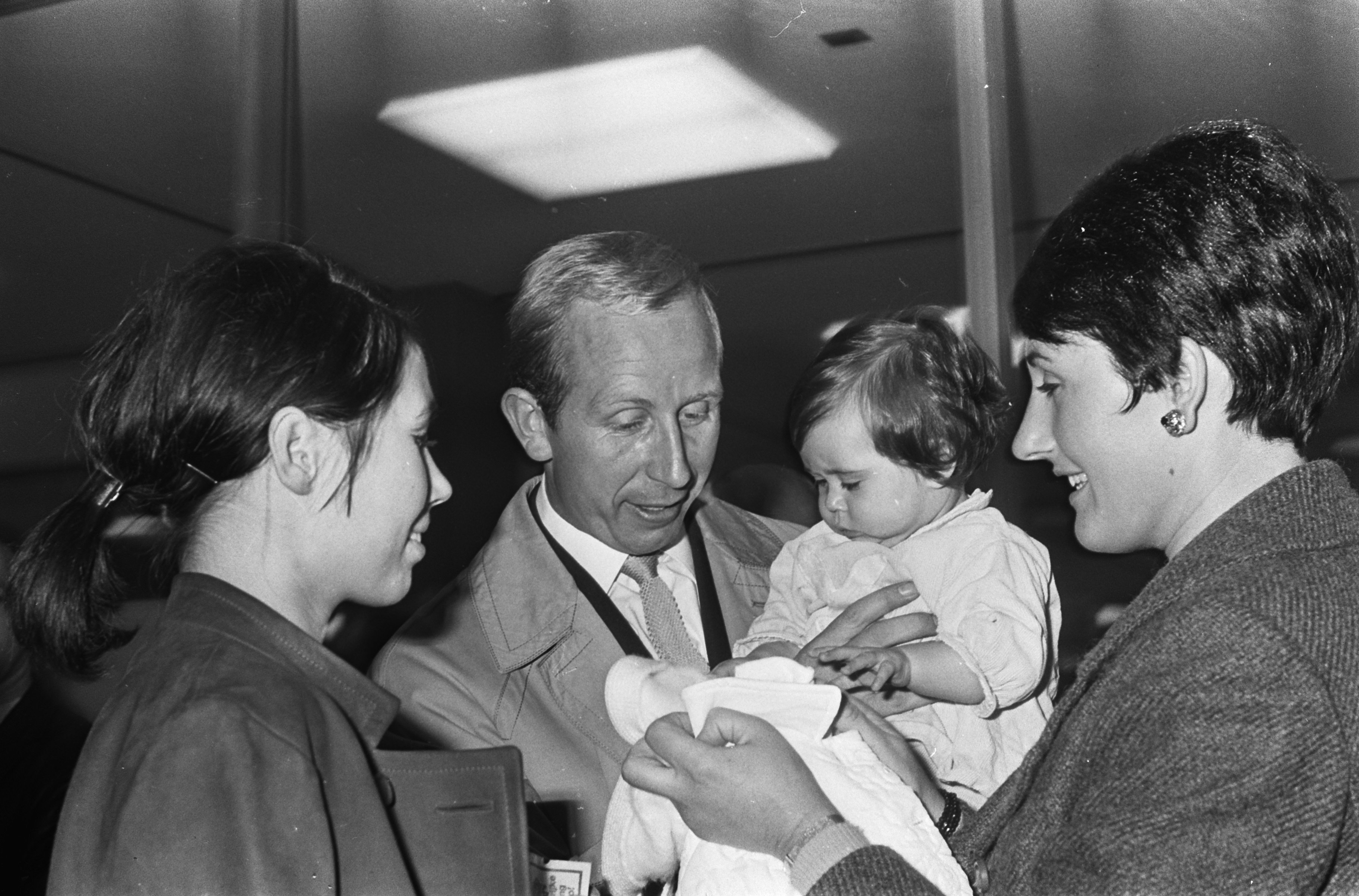 Collectie / Archief : Fotocollectie Anefo Reportage / Serie : [ onbekend ] Beschrijving : Aankomst Ajax op Schiphol. Henk Groot opgewacht door vrouw en dochtertje Datum : 12 oktober 1967 Locatie : Schiphol Trefwoorden : gezinnen, vliegvelden, voetballers Persoonsnaam : Groot, Henk Fotograaf : Jongerhuis, Pieter / Anefo Auteursrechthebbende : Nationaal Archief Materiaalsoort : Negatief (zwart/wit) Nummer archiefinventaris : bekijk toegang 2.24.01.05 Bestanddeelnummer : 920-7800